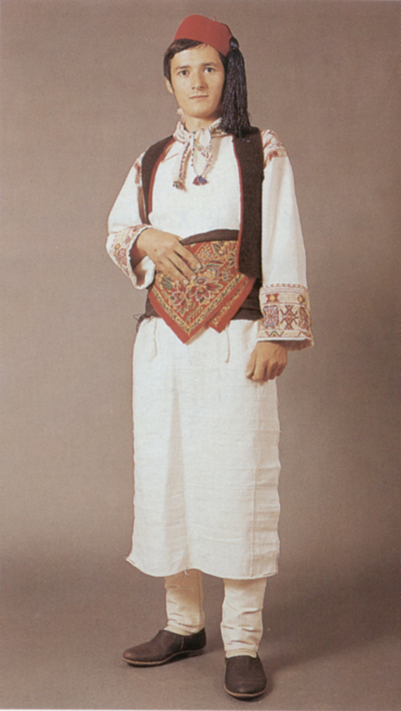 Ανδρική φορεσιά από το Πυργί Χίου. Συλλογή Πελοποννησιακού Λαογραφικού Ιδρύματος, Ναύπλιο